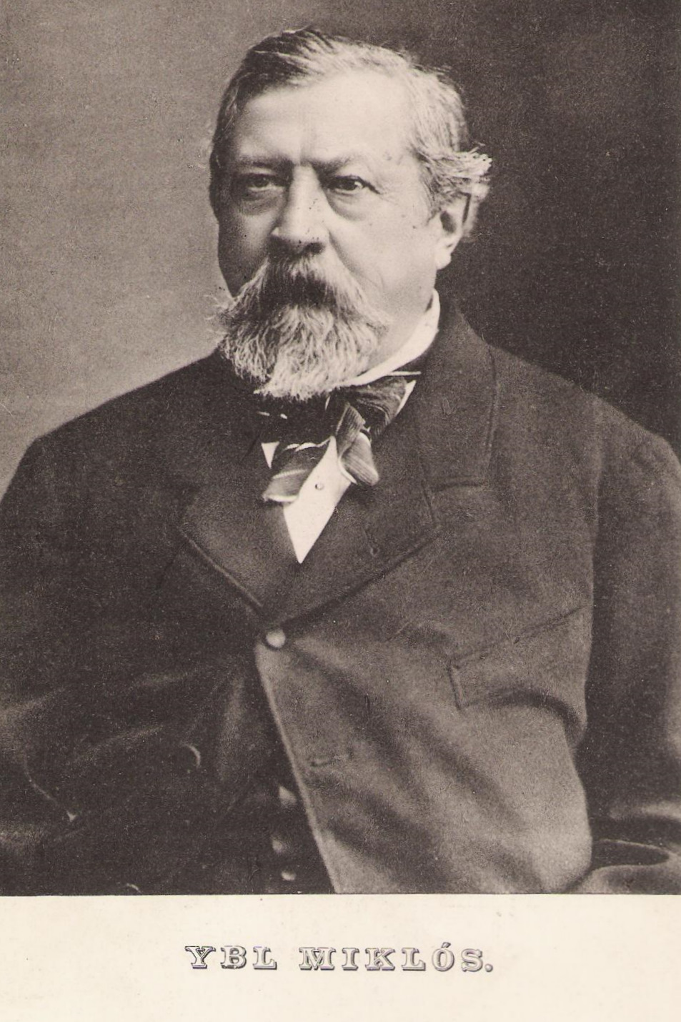 Ybl Miklós